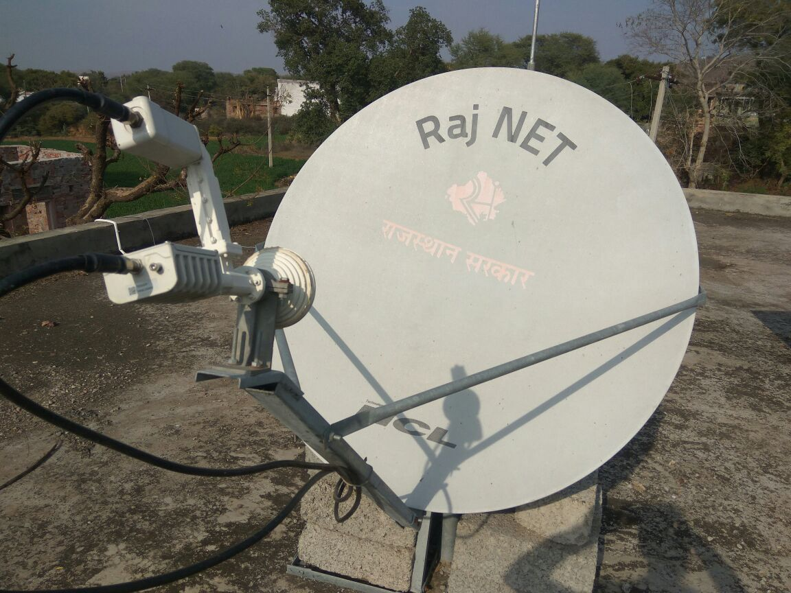 RAJNET CHATRI